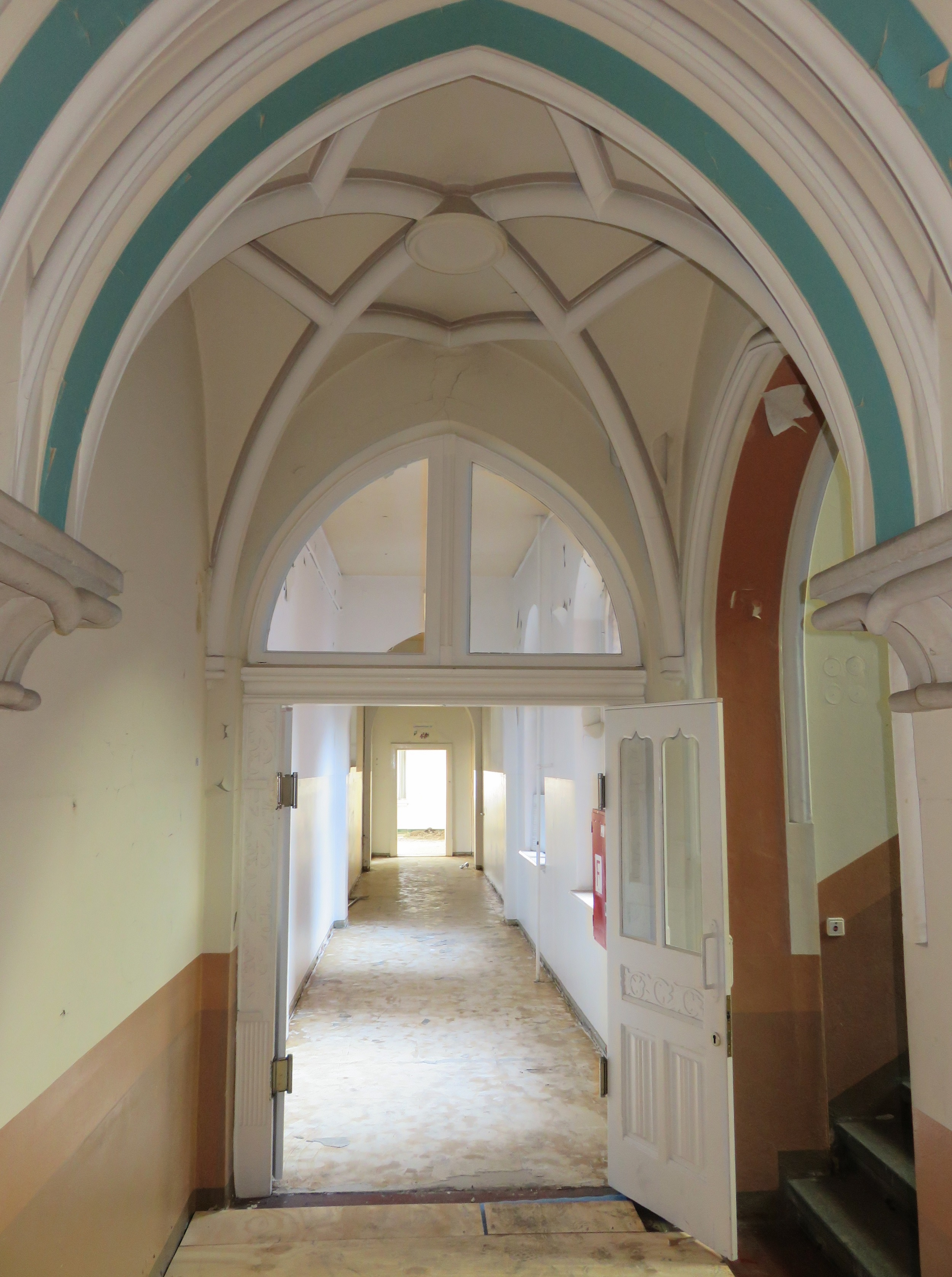 Ehemalige Postdirektion, Reichsstraße 11, Chemnitz-Kaßberg. Detailansicht, Haupttreppenhaus an Seite der Reichsstraße. Zweites Obergeschoß. Blick in Richtung Norden.